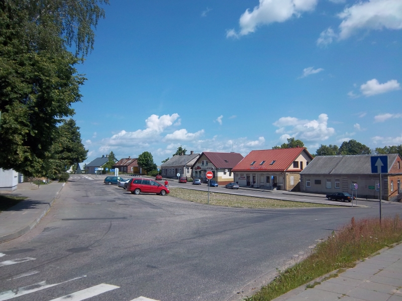 Centrinė Žaslių aikštė, Kaišiadorių r.